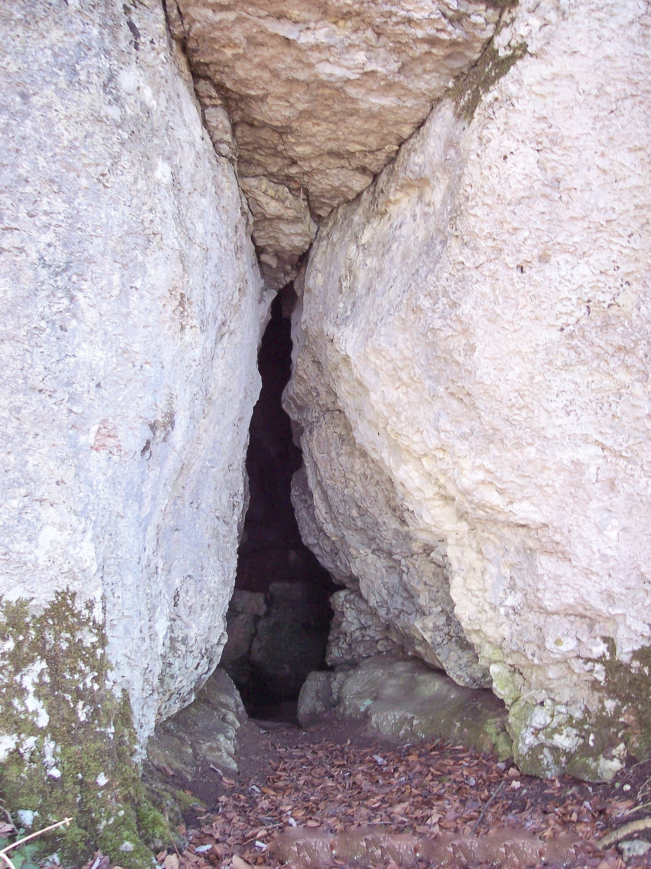 Entrée de la grotte du docteur Herring. Bendorf. Haut-Rhin